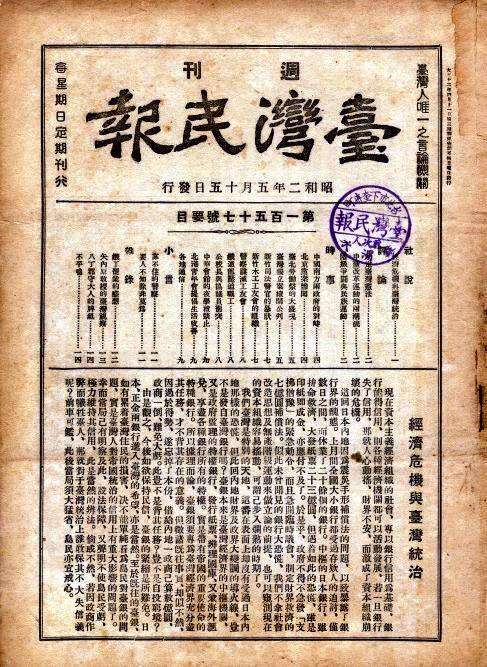 中文（台灣）: 1927年（昭和二年）5月15日發行之《臺灣民報》第157號，封面標榜「臺灣人唯一之言論機關」。